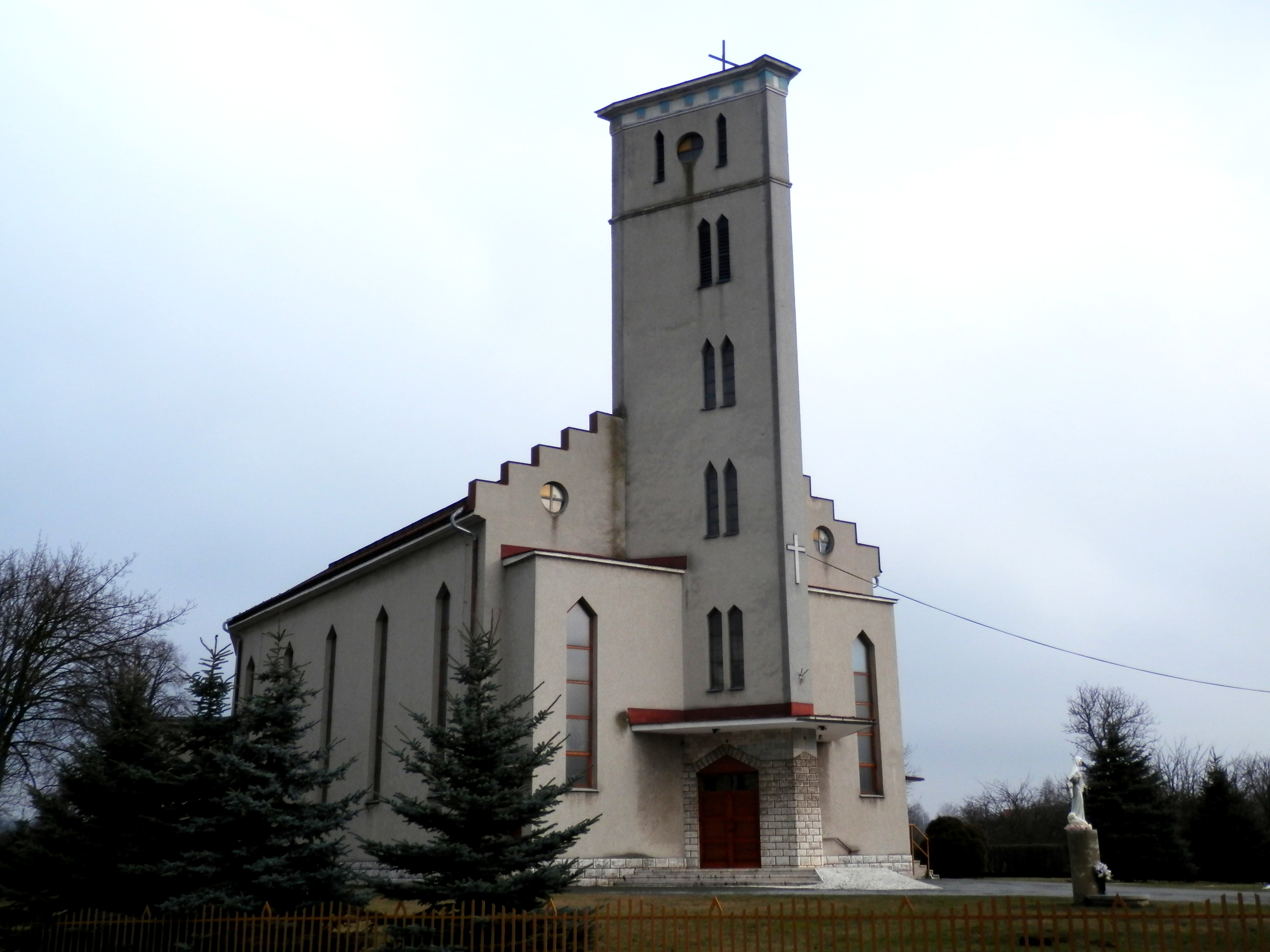 Novší kostol v obci Záhradné.